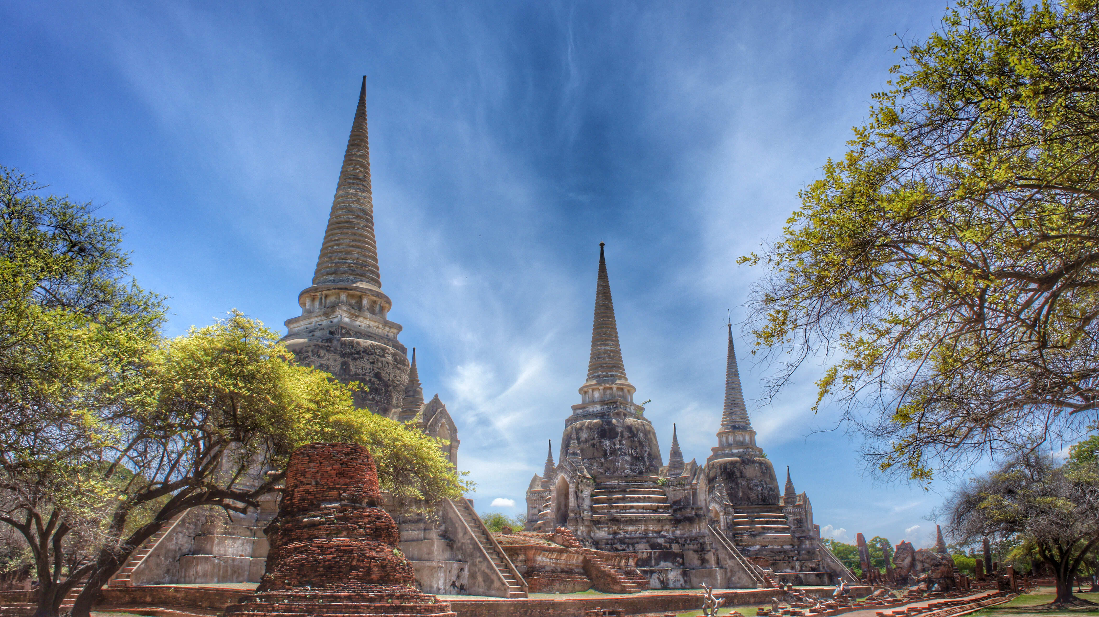 วัดพระศรีสรรเพชญ์ จังหวัดพระนครศรีอยูธยา